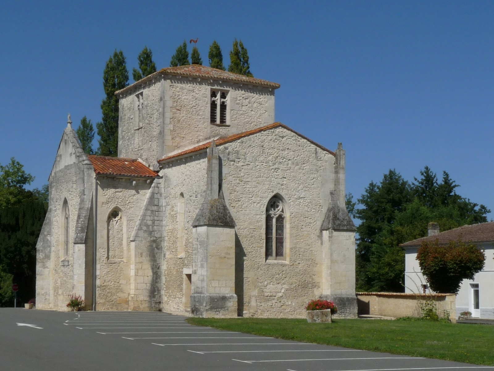 Eglise de St-Germain-de-Vibrac, Charente-Maritime, France